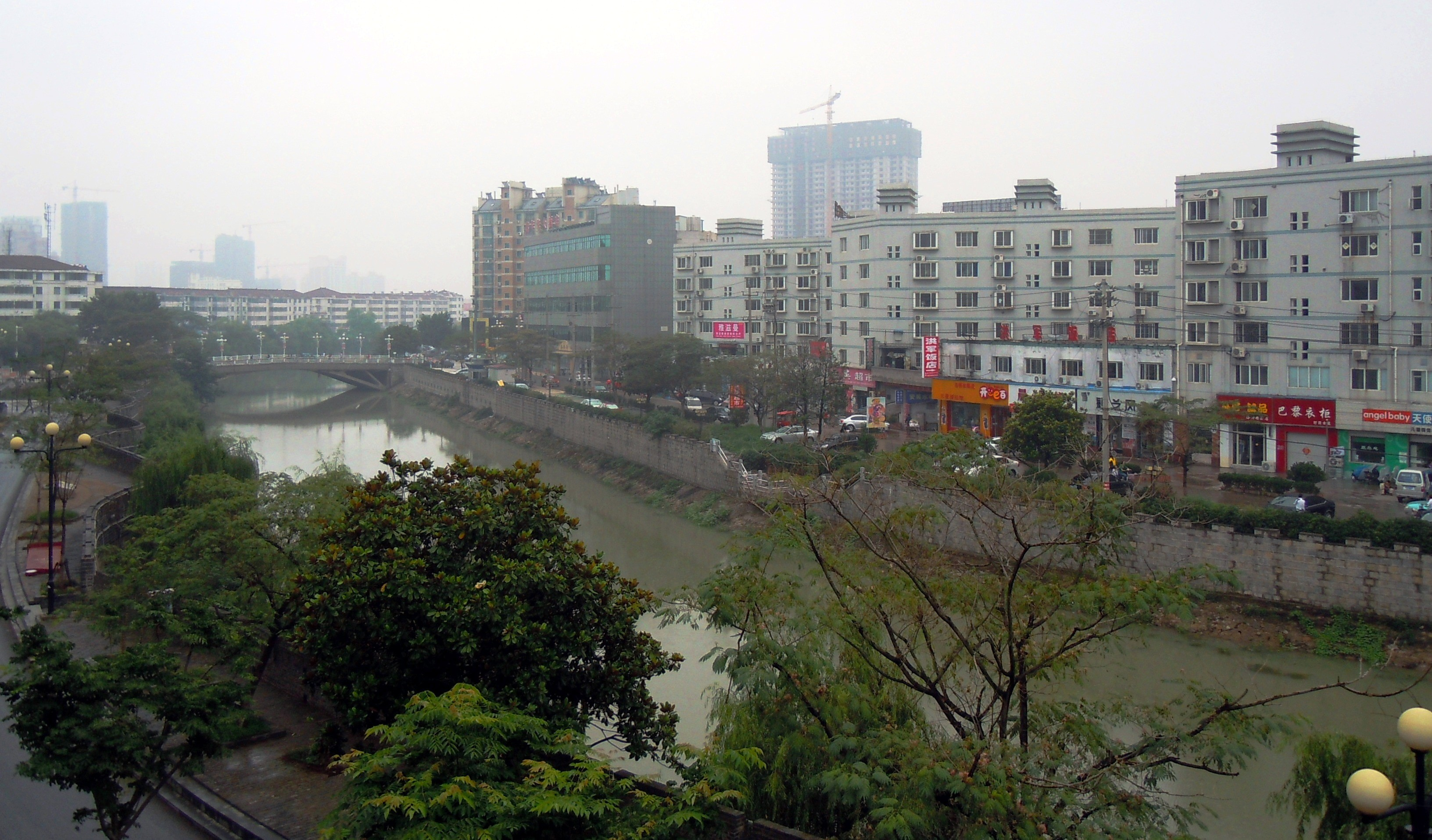 沭阳县老沭河滨河景观